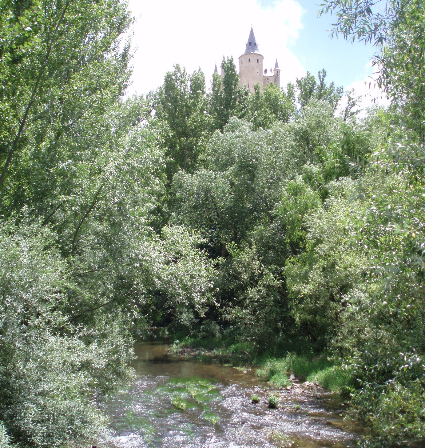 Torres del alcázar de Segovia (España) evándose sobre el río Eresma .